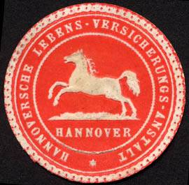 Sealing stamp Title: Hannoversche Lebens - Versicherungs - Anstalt - Hannover Description: rot, weiß, geprägt Place: Hannover size: 3 cm